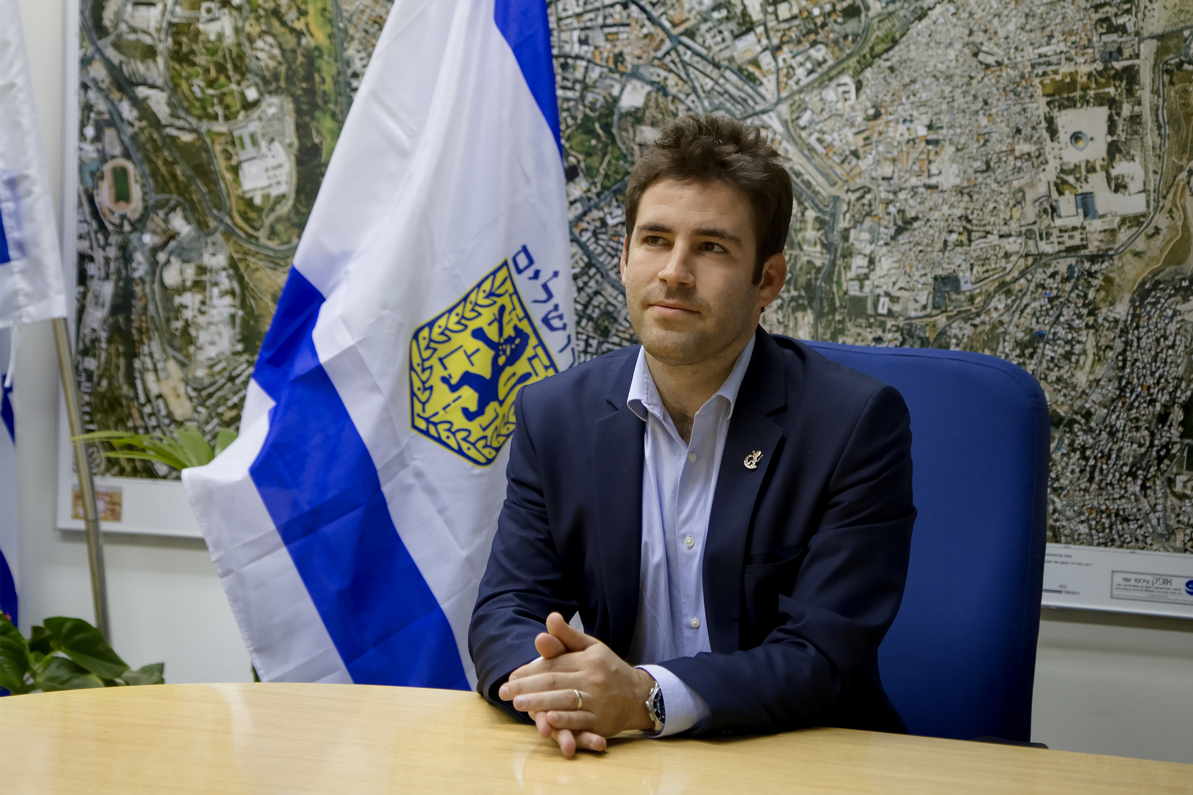 עופר ברקוביץ'